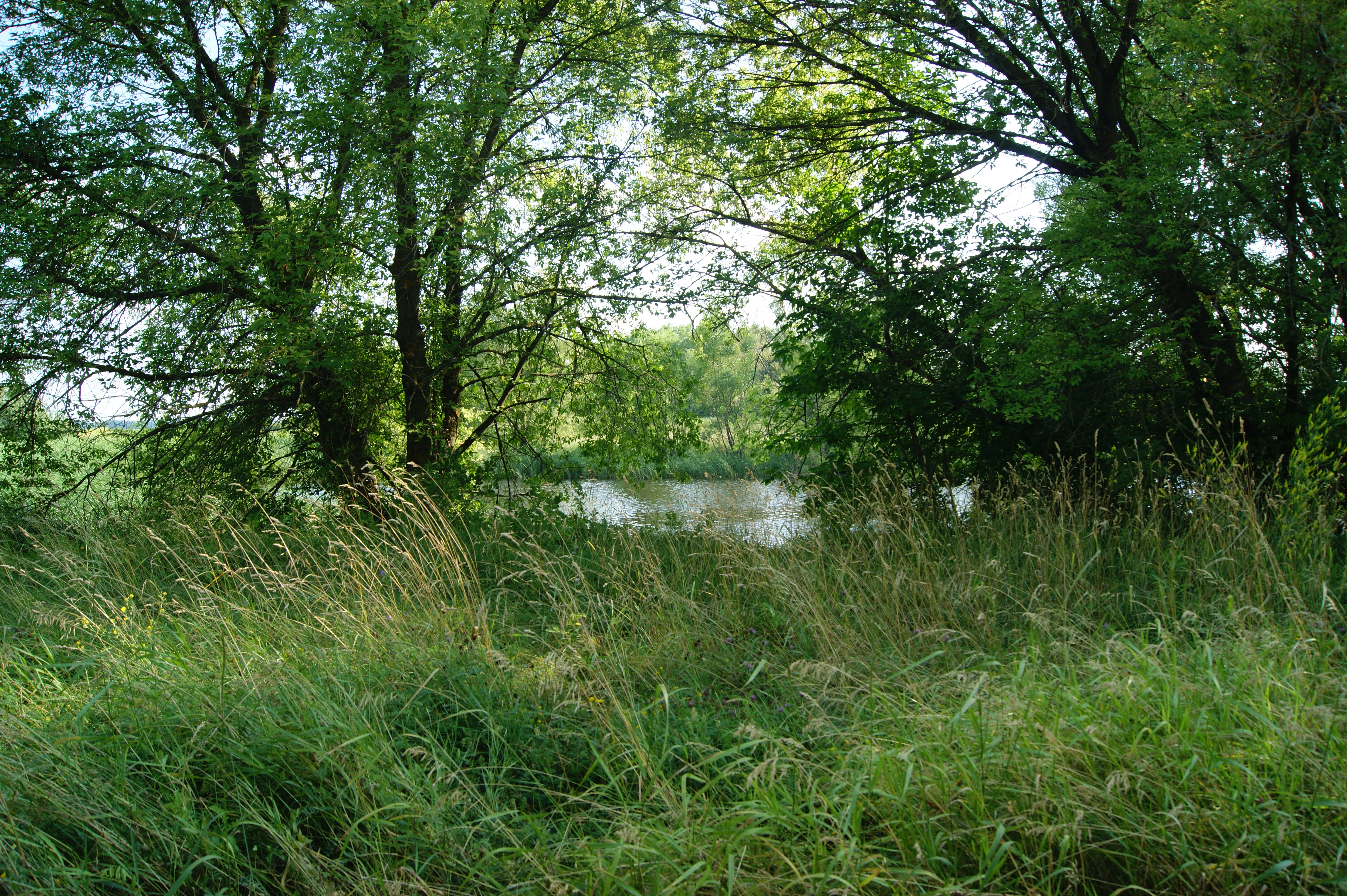 Пруд в имении Филиппова/Thickets on the shore of a pond in the former Filippov estate near the village of Alekseyevka, Dobrinsky district, Lipetsk region